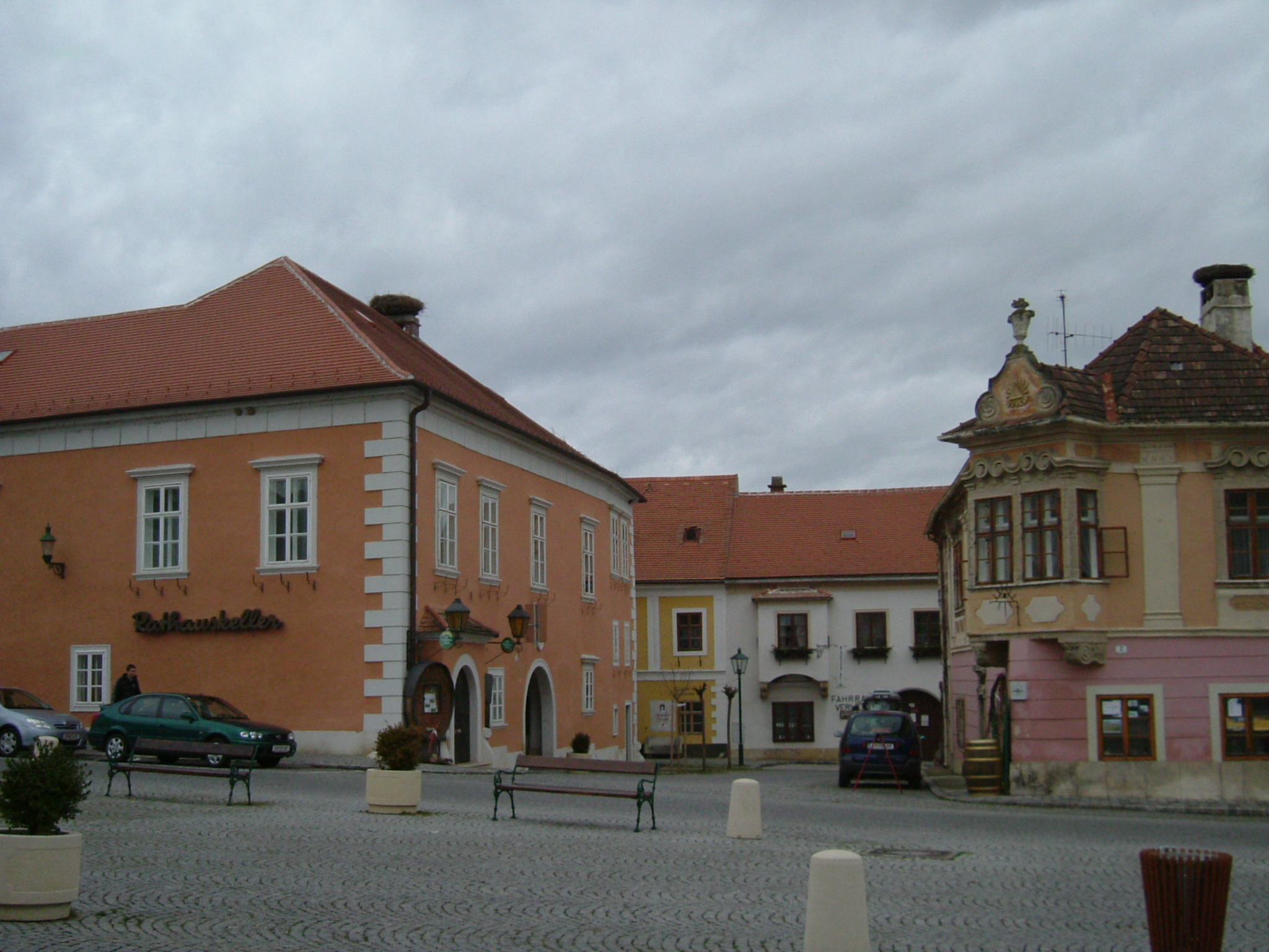 Rust - Austria, Burgenland